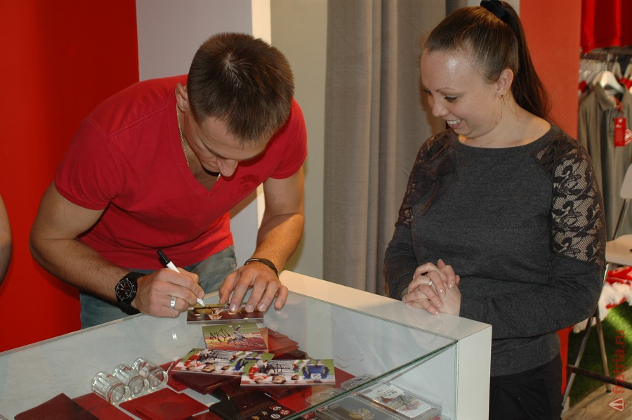 Артем Ребров на автограф-сессии в офисе "Фратрии". 2014 год